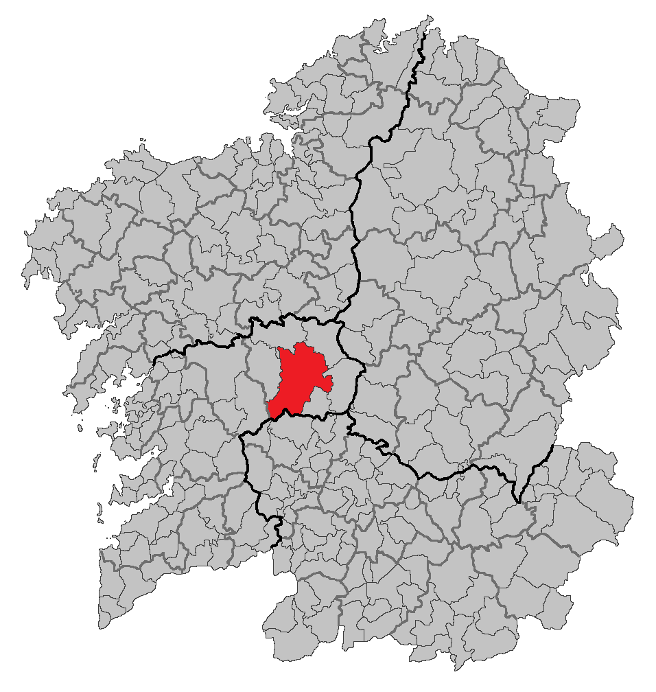 Mapa coa localización do concello de Lalín.